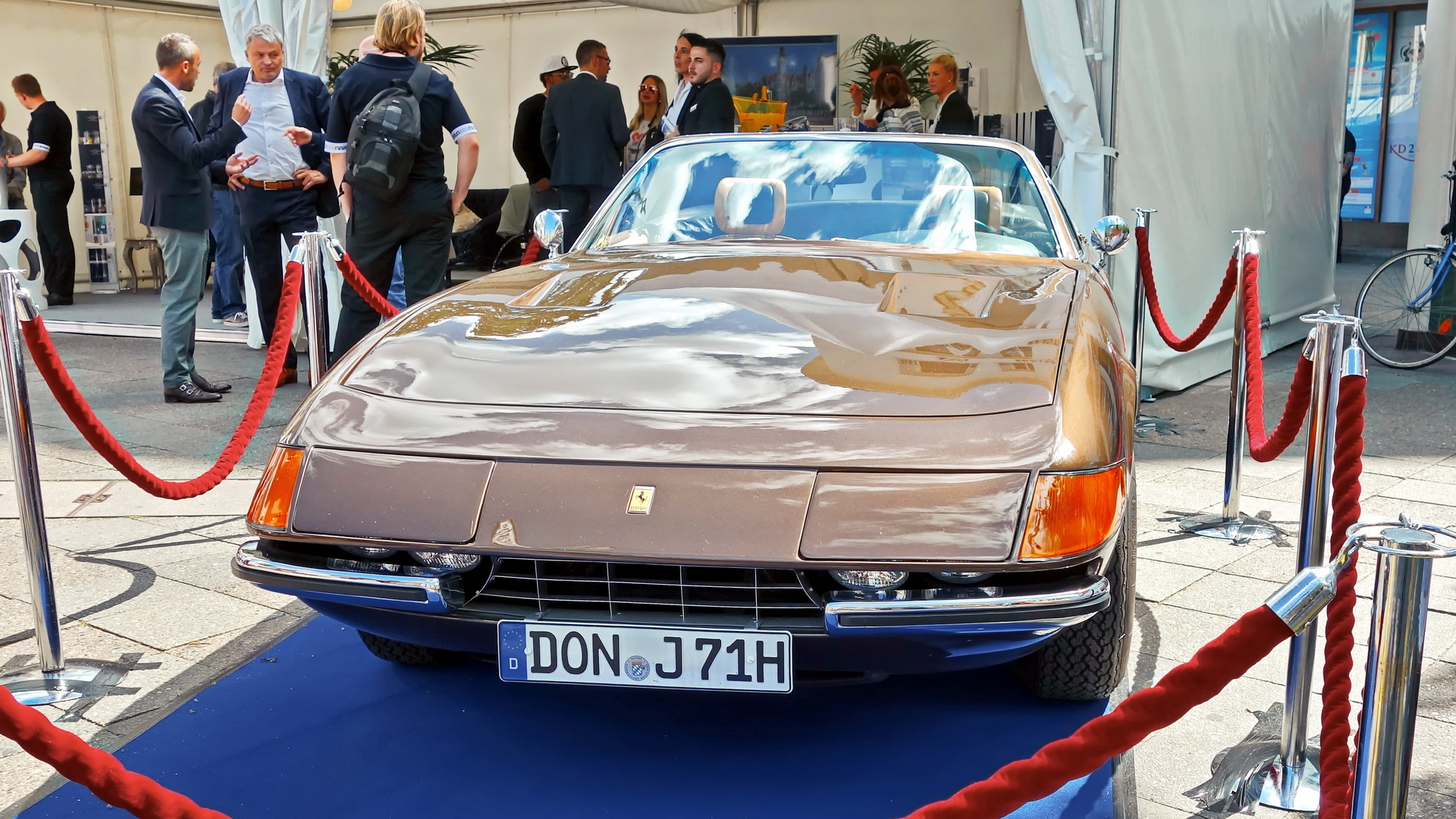 Ferrari 365 GTB/4 "Daytona"